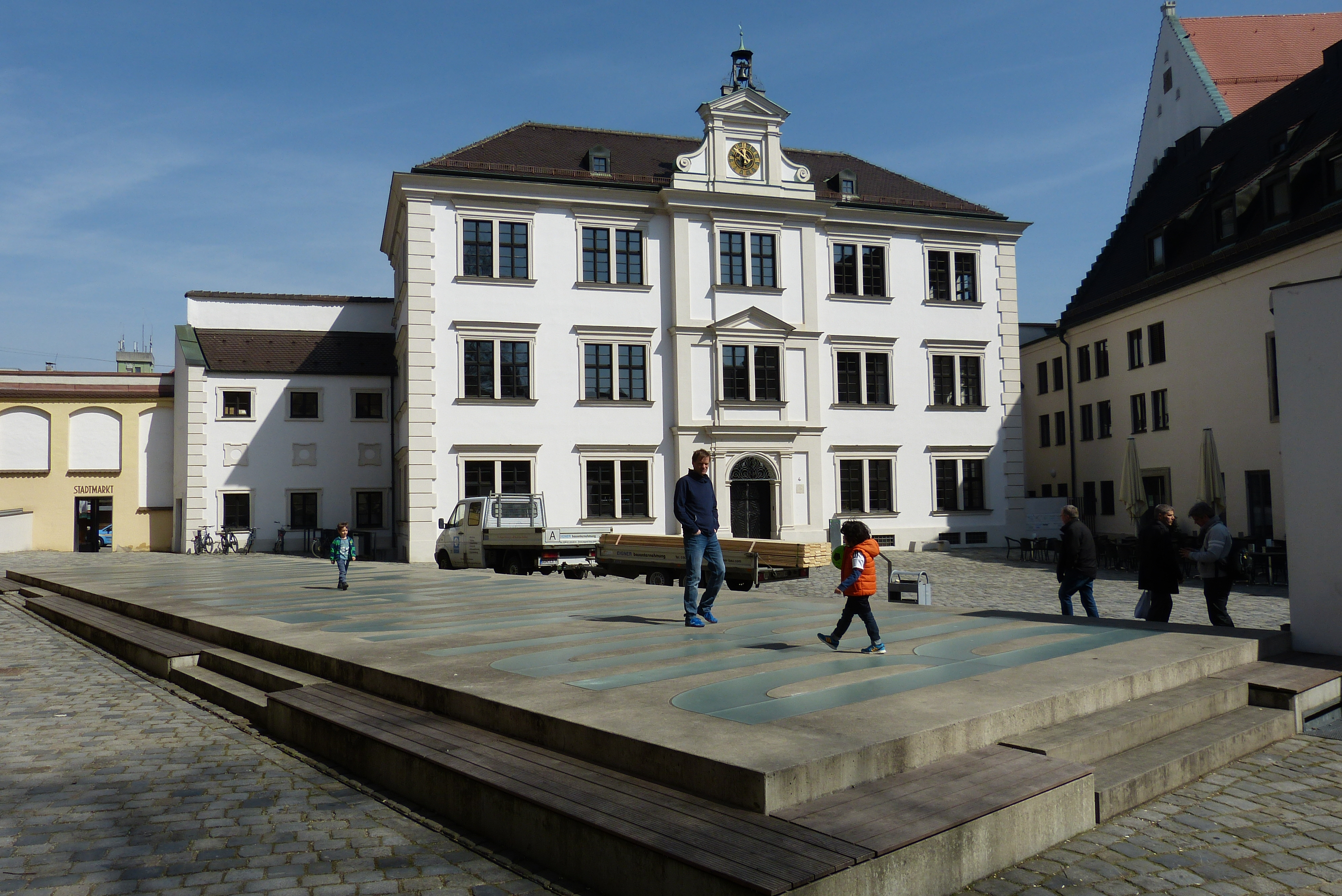 Der Annahof in Augsburg. Im Hintergrund das ehemalige Gymnasium bei St. Anna, erbaut von Elias Holl.